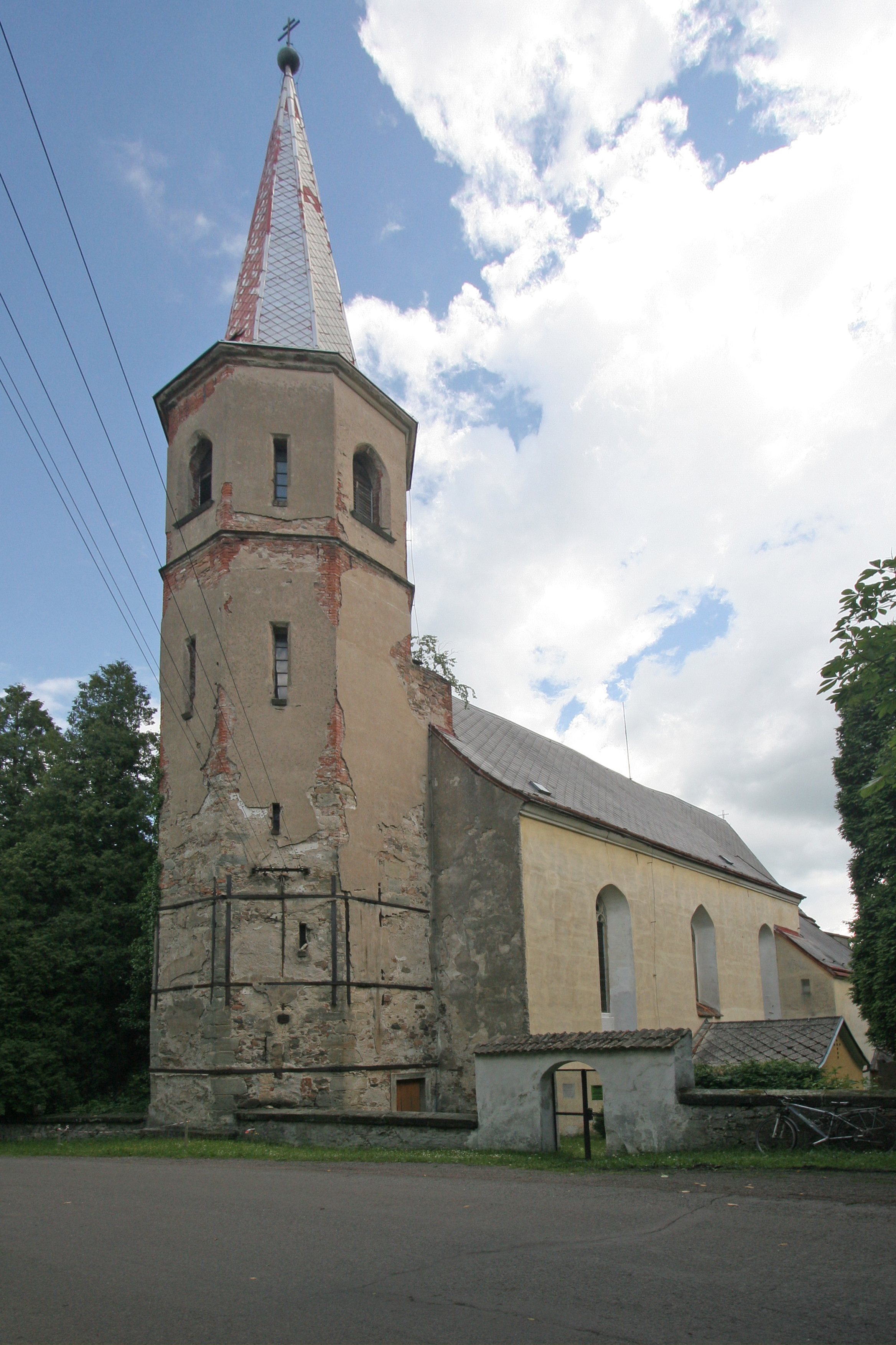 Kostel sv. Jakuba (Práčov), Práčov